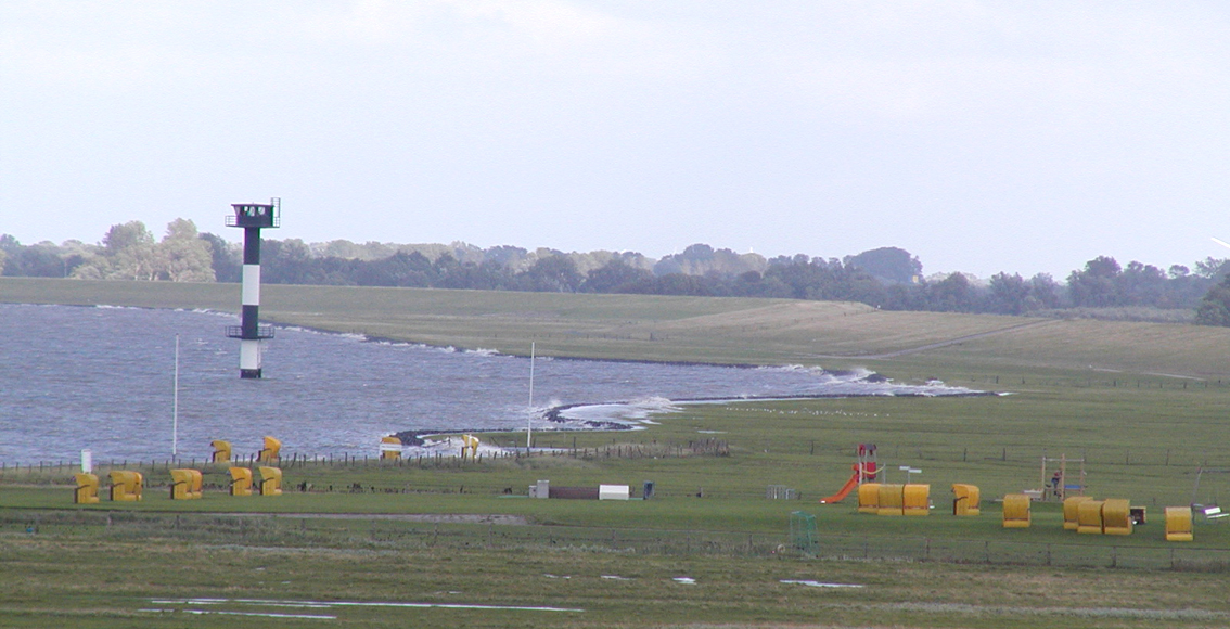 Unterschieden in der Deichlinie beim Altenbrucher Bogen / Glameyer StackHafen